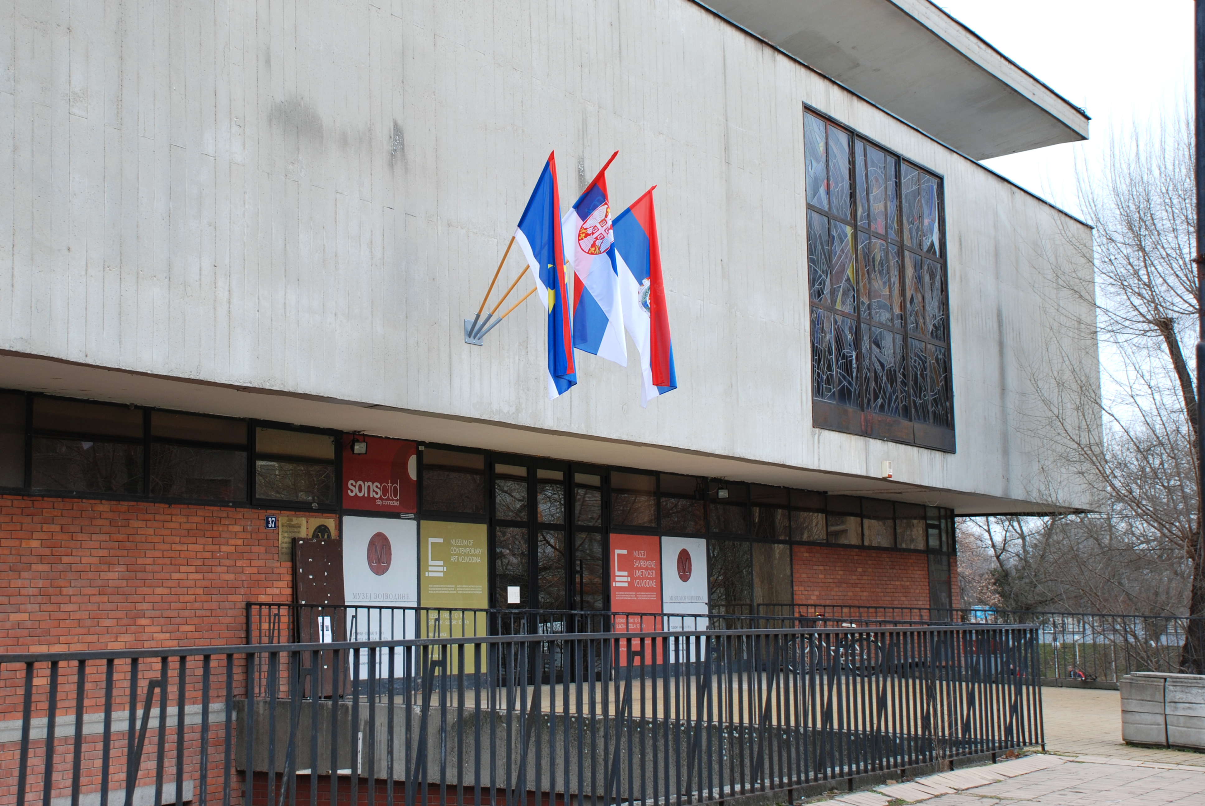 Srpski (latinica): Zgrada nekadašnjeg Muzeja socijalističke revolucije Vojvodine u Dunavskoj 37 u Novom Sadu. Danas zgradu dele Muzej savremene umetnosti Vojvodine i Odeljenje za noviju istoriju Muzeja Vojvodine.